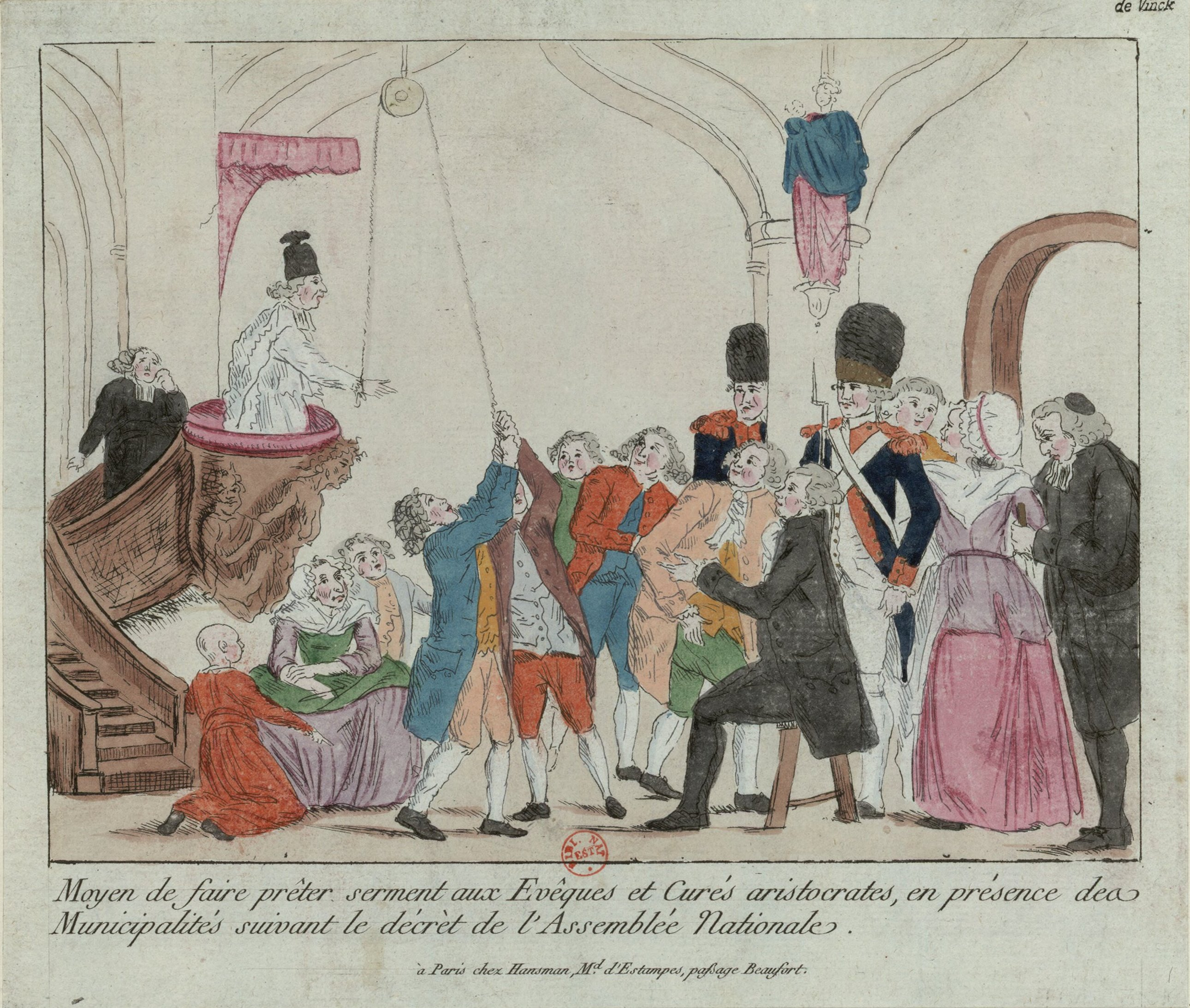 Moyen de faire prêter serment aux evêques et curés aristocrates, en présence des municipalités suivant le décrèt de l'Assemblée nationale.